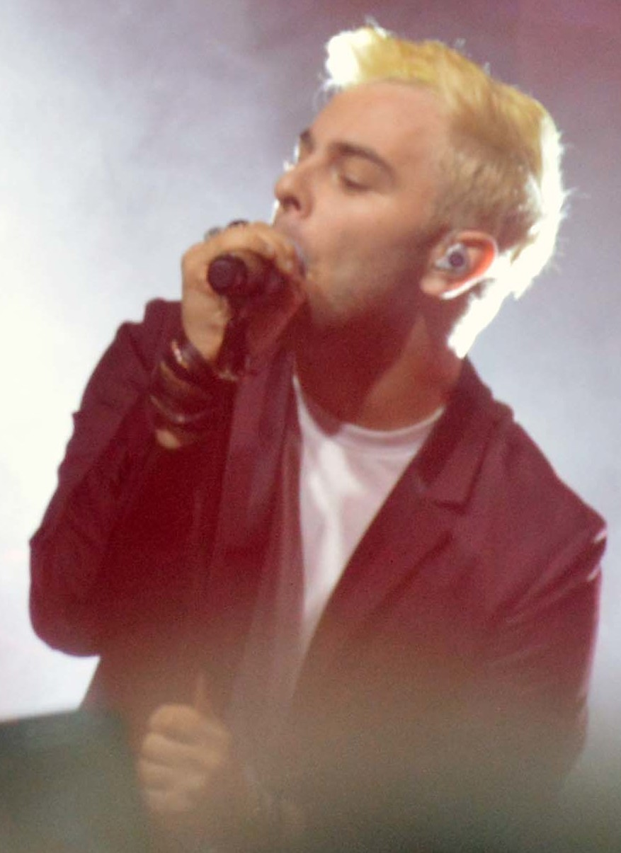 Lorenzo Fragola in concerto al Teatro della Concordia a Venaria R. (Torino)